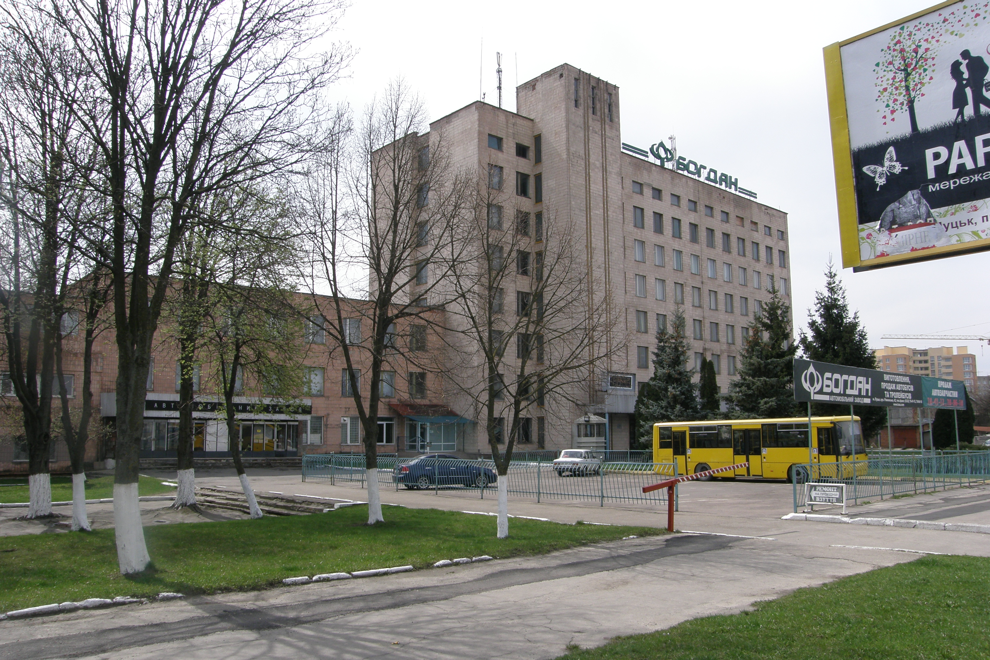 Das Werk der Firma Bogdan in Luzk